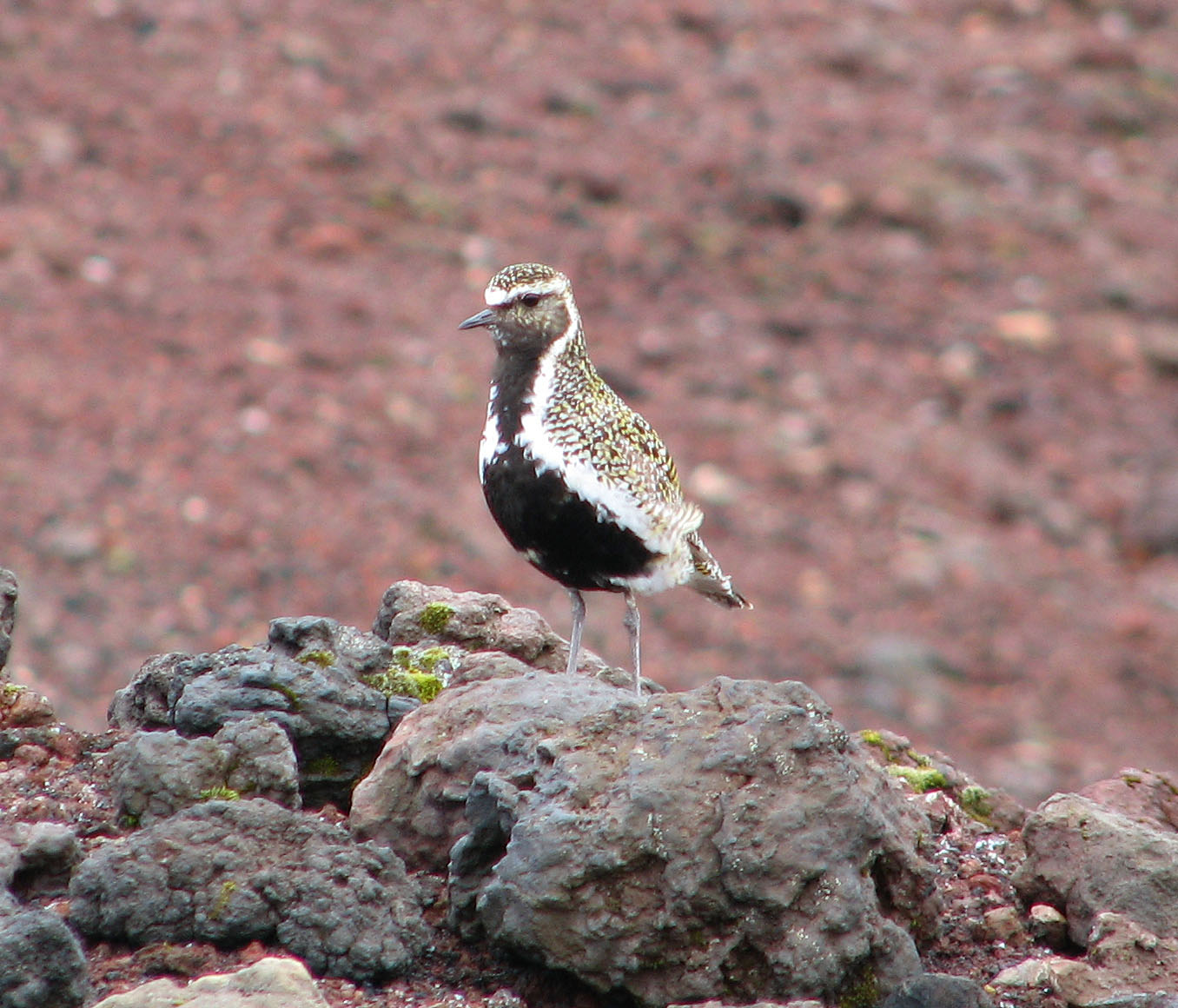 Golden Plover 01